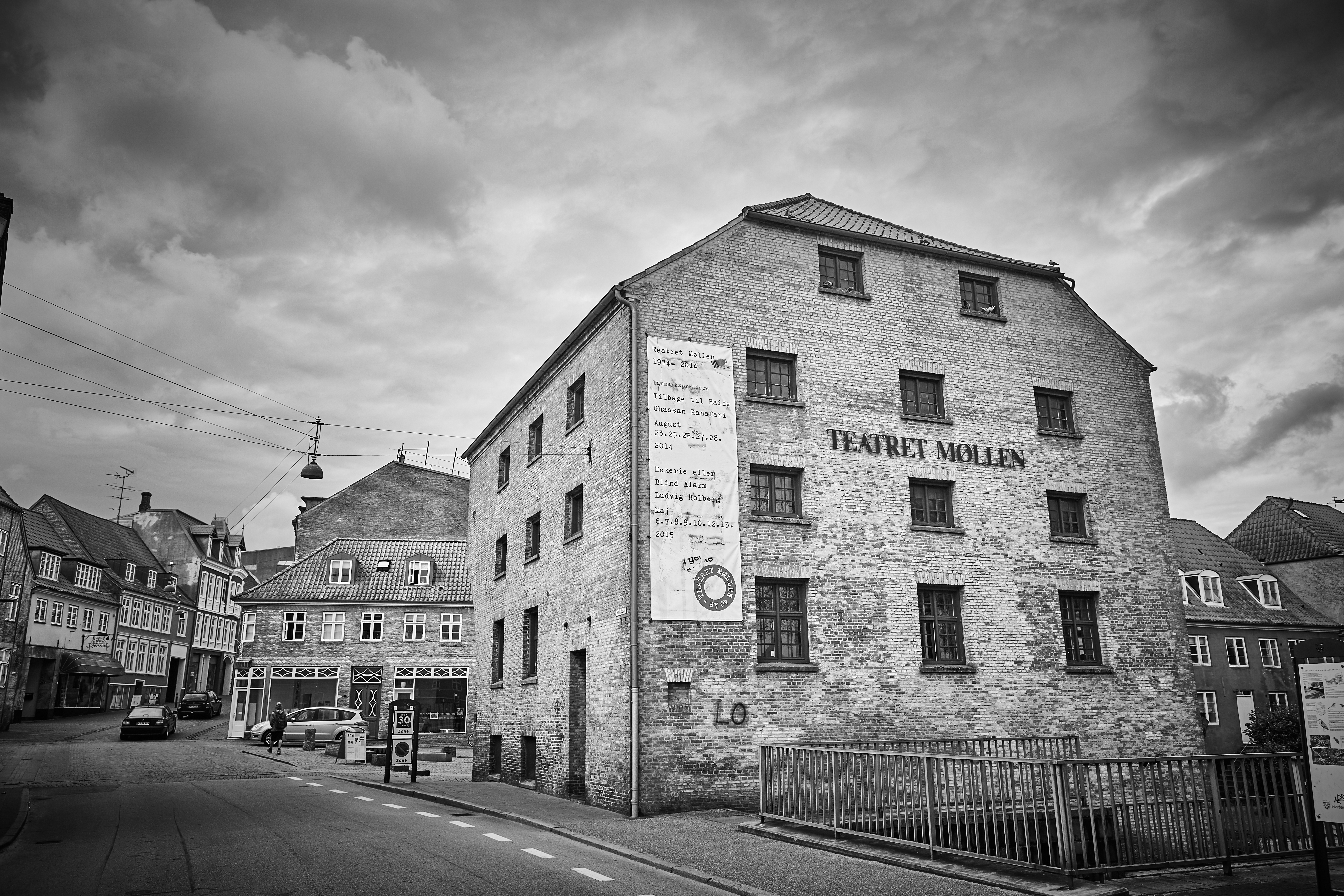 Teatret Møllen set fra gaden i Haderslev.